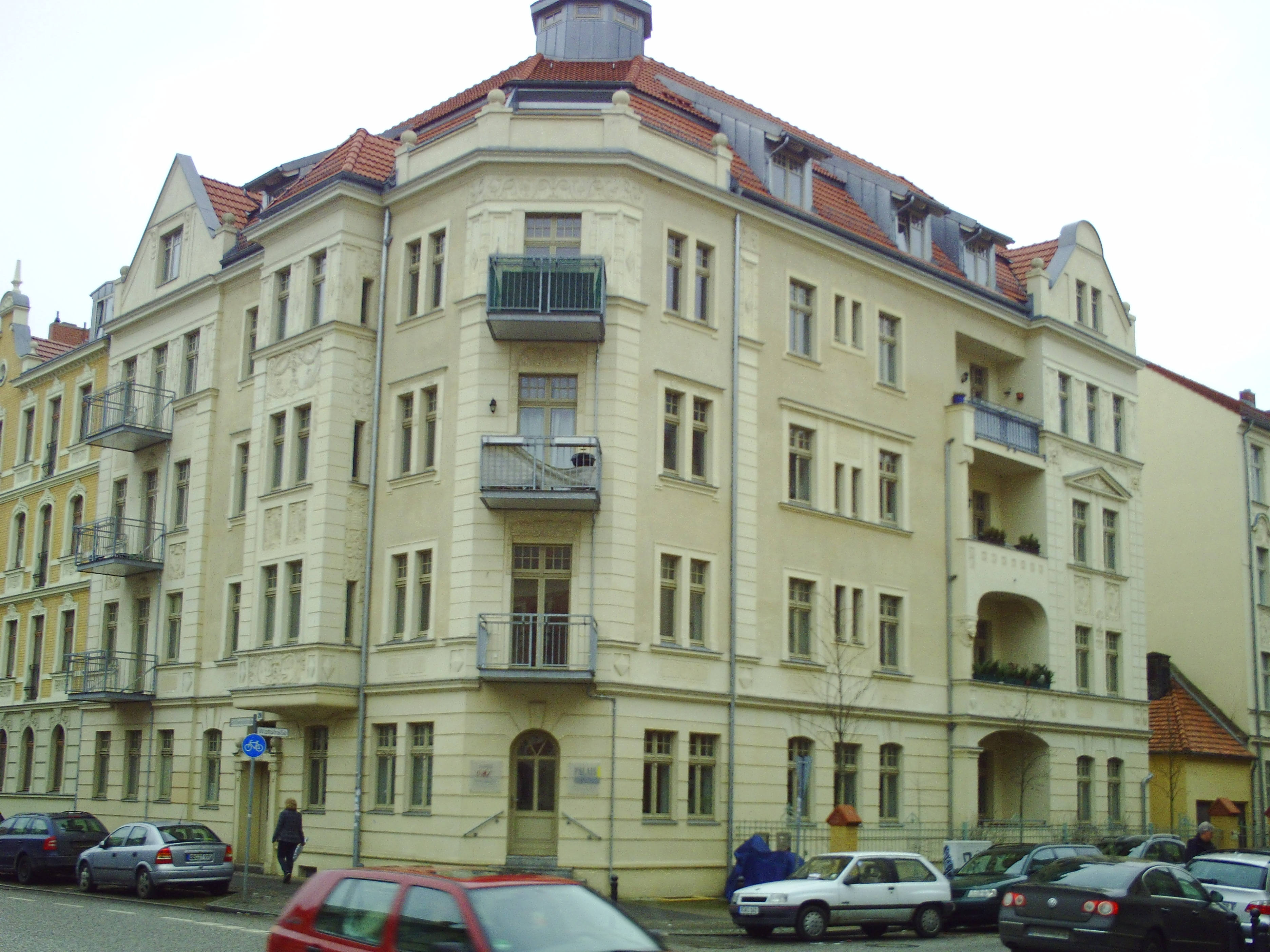 Historisches Gebäude in Potsdam-Babelsberg am Anfang der Großbeerenstraße.‚‘